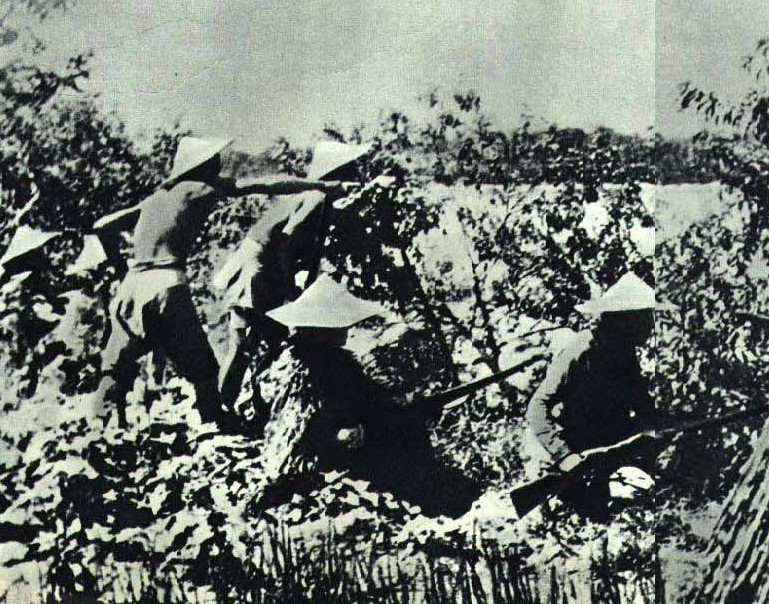 1965-9 抗日战争期间华中地区反清乡斗争